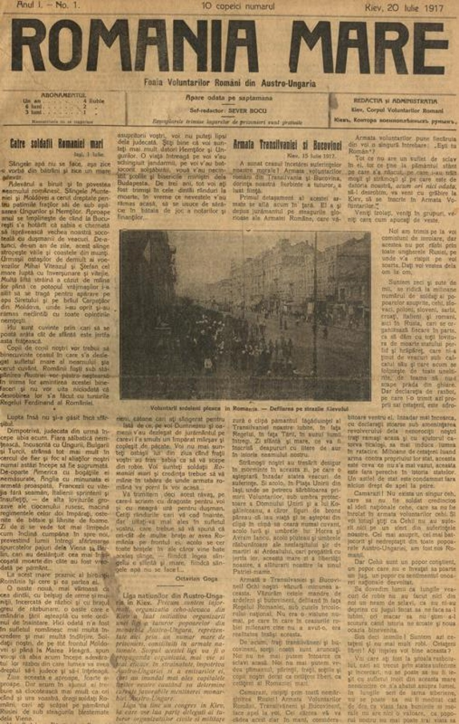 România Mare, Foaia Voluntarilor Români din Austro-Ungaria. Anul I, Nr. 1, Kiev, 20 iulie 1917. Apariție: o dată pe săptămână. Redactor-șef: Sever Bocu. Conține 4 pagini. Rubricație: Plecarea transportului al doilea de voluntari - către armata română (p. 2), Primirea voluntarilor ardeleni la Iași (p. 3); Apărută în Darnița (Kiev), Rusia